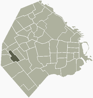 Barrio de Villa Luro